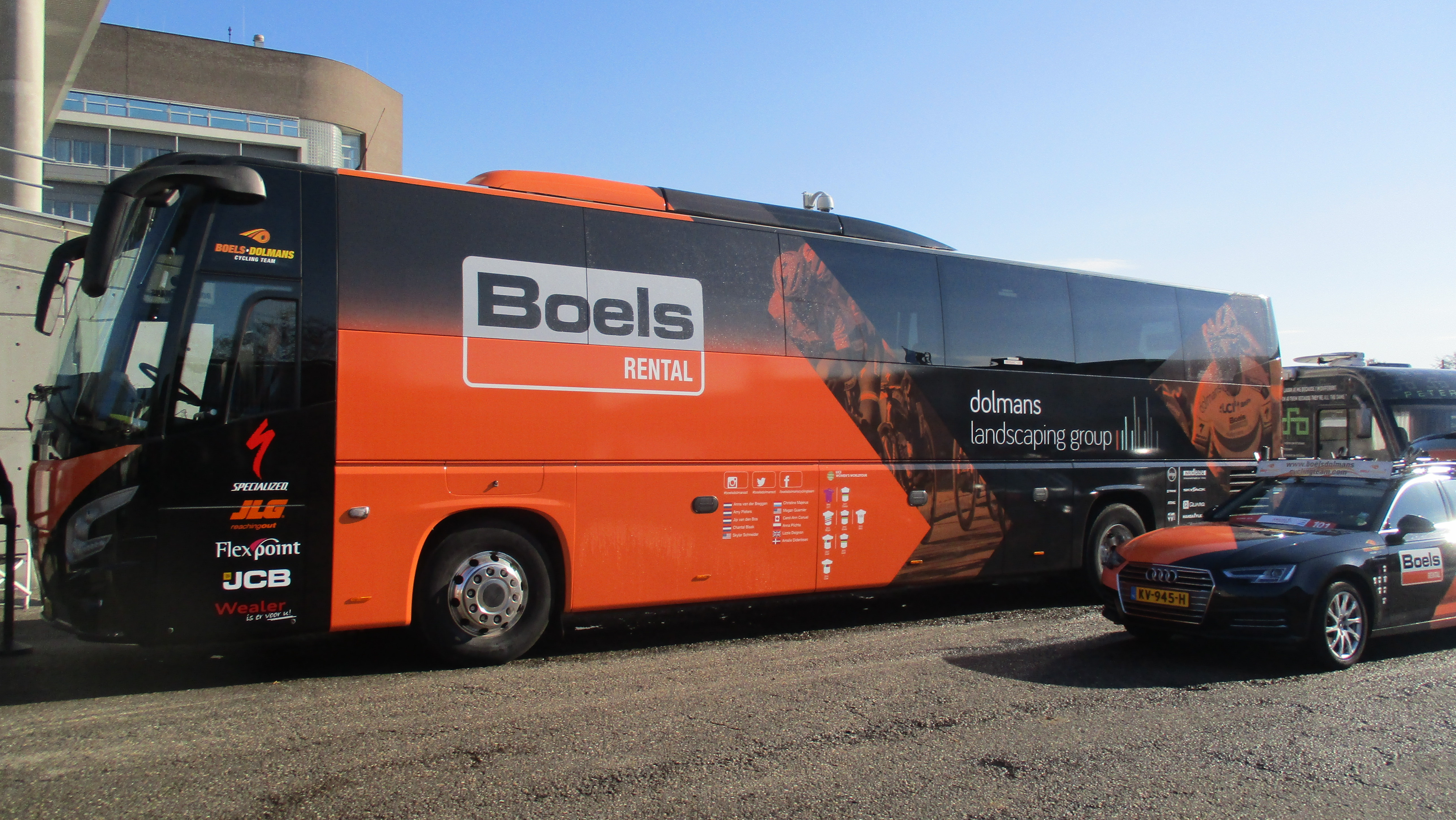 Start van de Amstel Gold Race Ladies Edition 2018 in Maastricht.